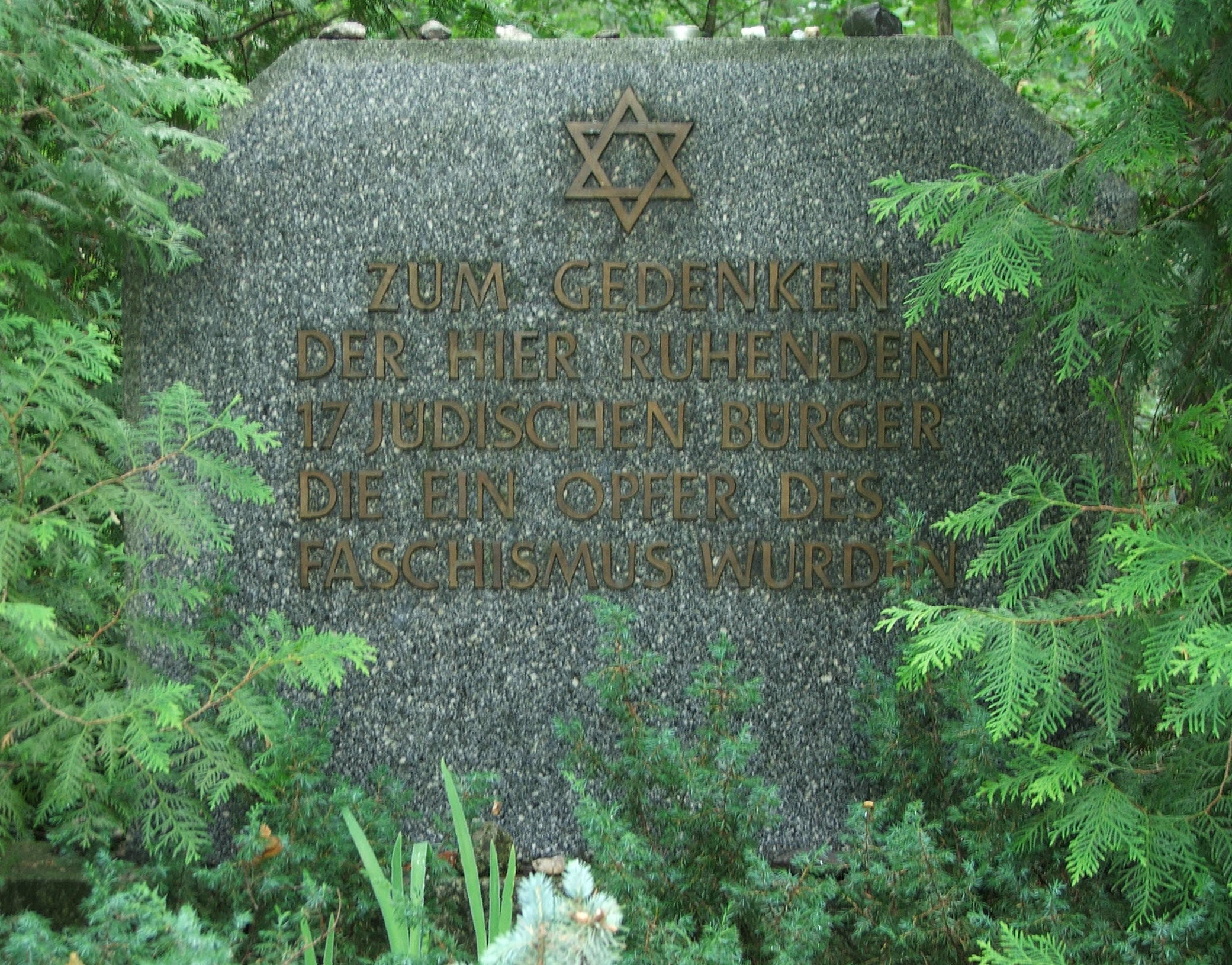 Denkmal am Kilimeter 106,7 Der Verlorene Zug